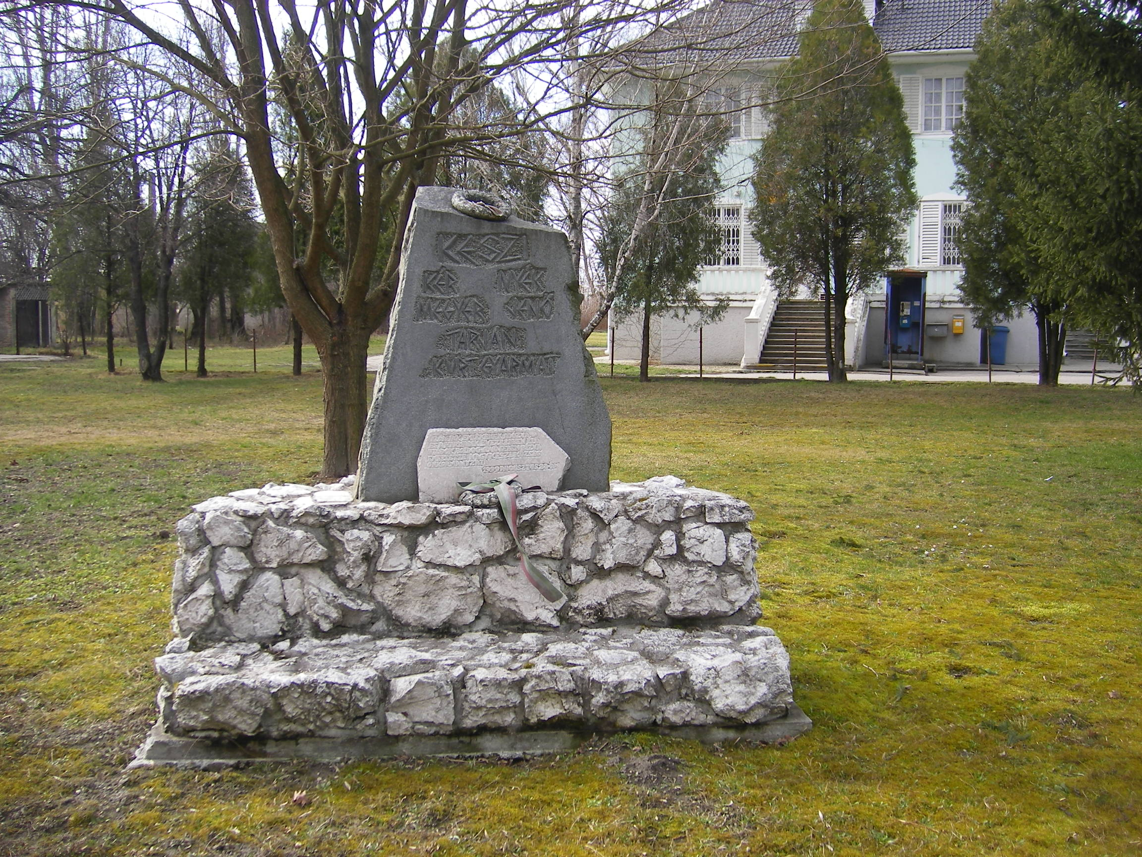 Nagykeszi - a honfoglaló törzsek emlékműve